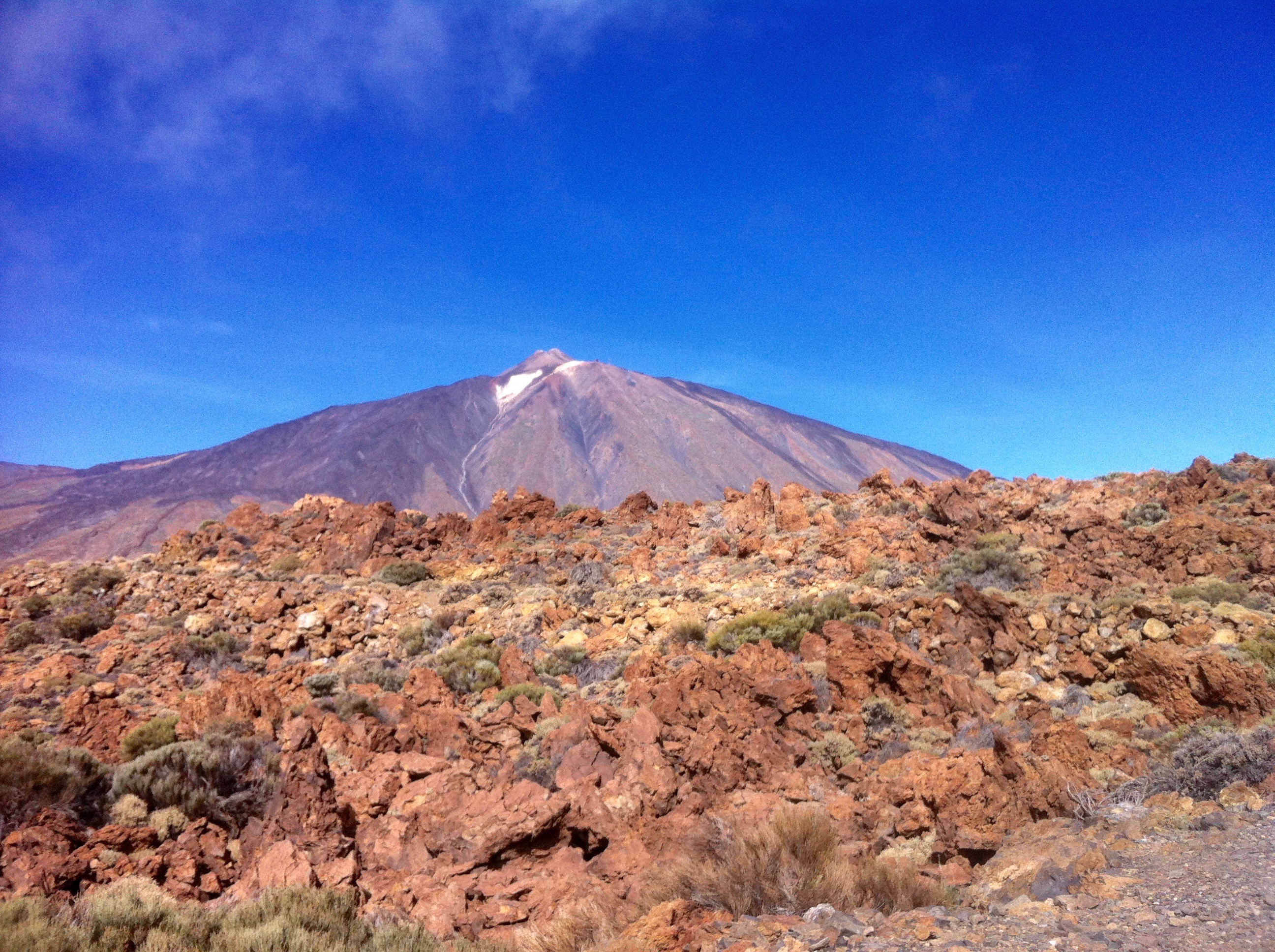 Teide - utsikt mot toppen på 3.718 meter över havet från cirka 2.200 meters höjd.